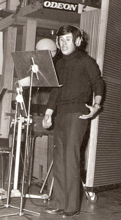 Beto Orlando en los estudio de EMI.